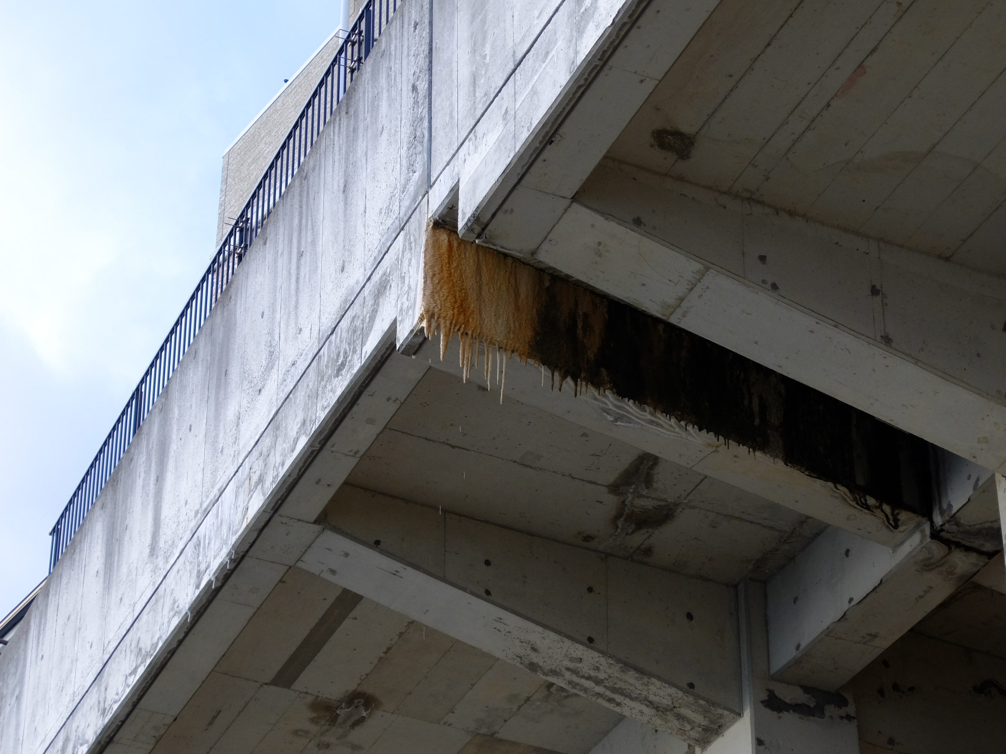 エフロレッセンス（白華現象）